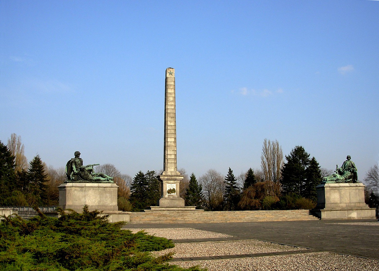 Cmentarz Żołnierzy Radzieckich przy ul.Żwirki i Wigury w Warszawie.